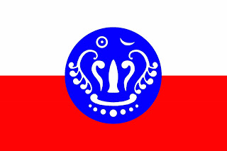 မြန်မာဘာသာ: ရခိုင်အလံ